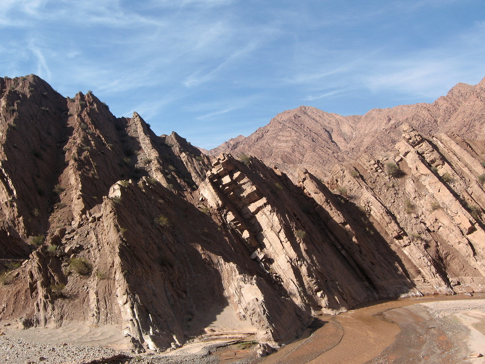 Quebrada de La Troya, departamento Vinchina, provincia de La Rioja, Argentina. Camino a la Reserva Laguna Brava